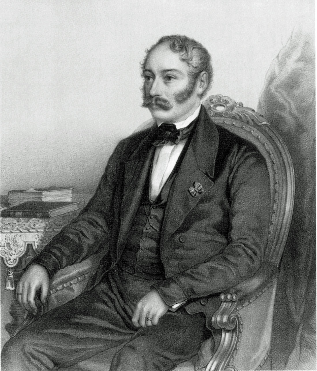 Wilhelm Markgraf von Baden (1792 - 1859)